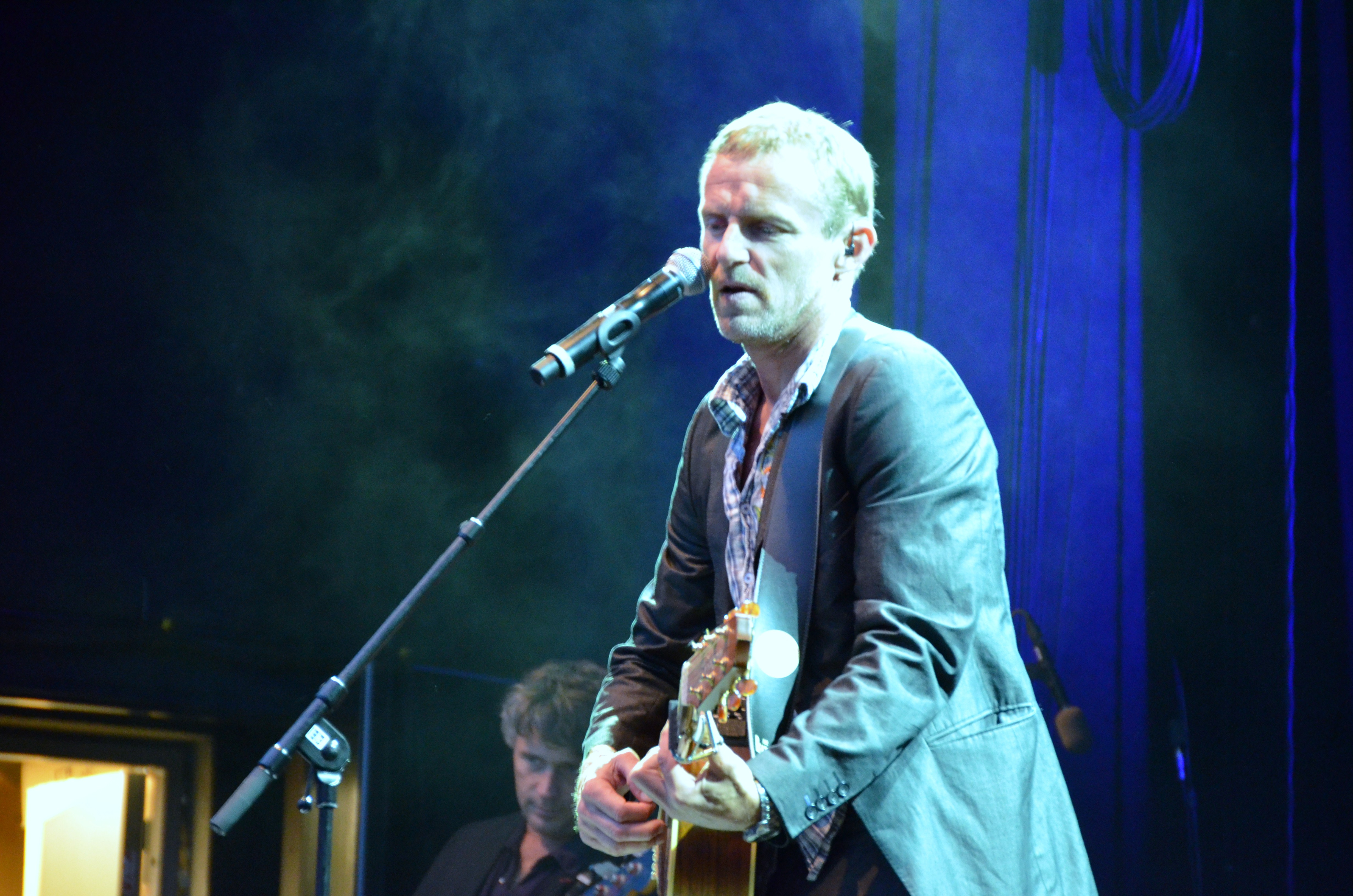 Di Derre (20)